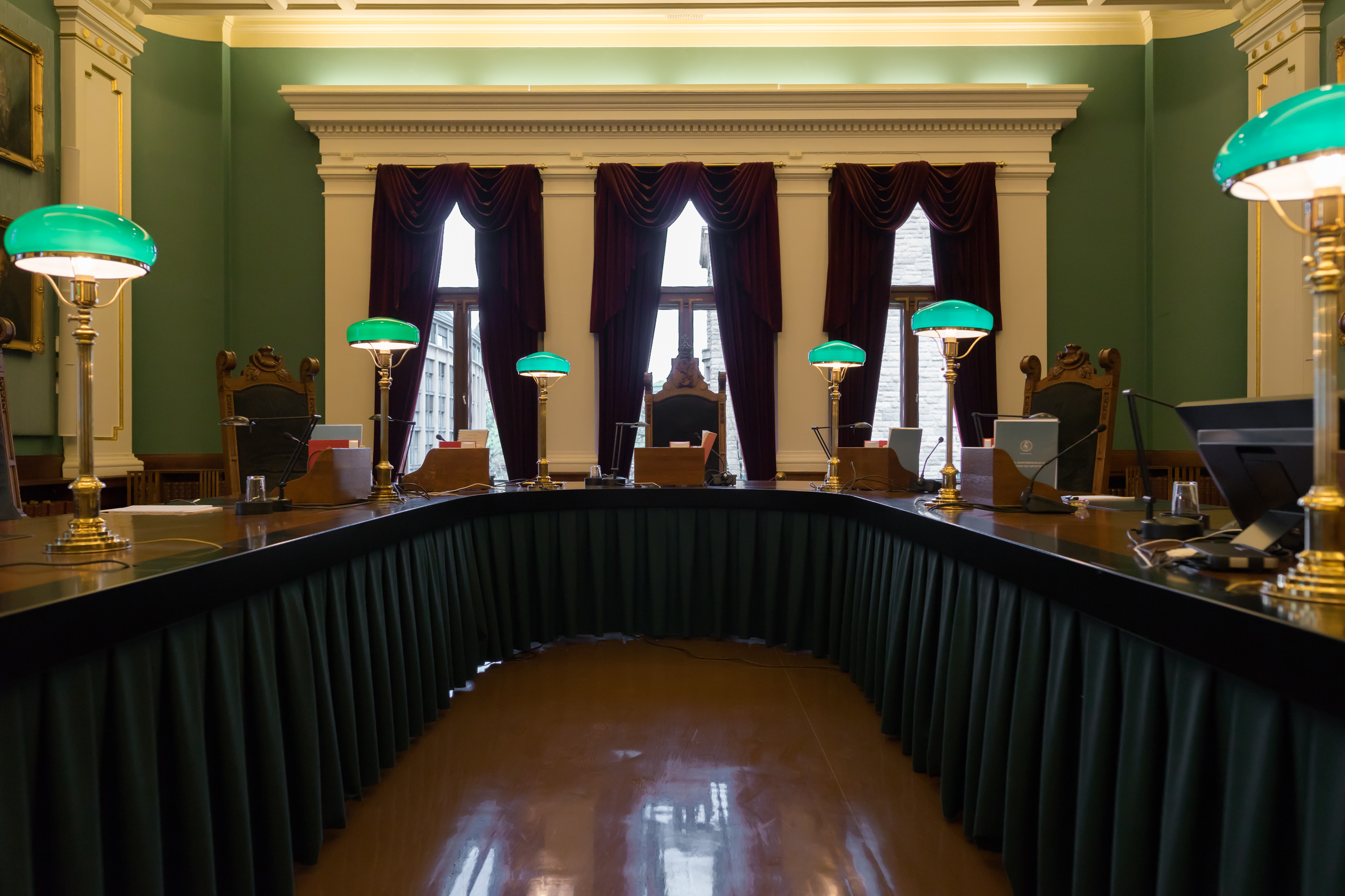 Rettsal for første avdeling i Høyesteretts hus.